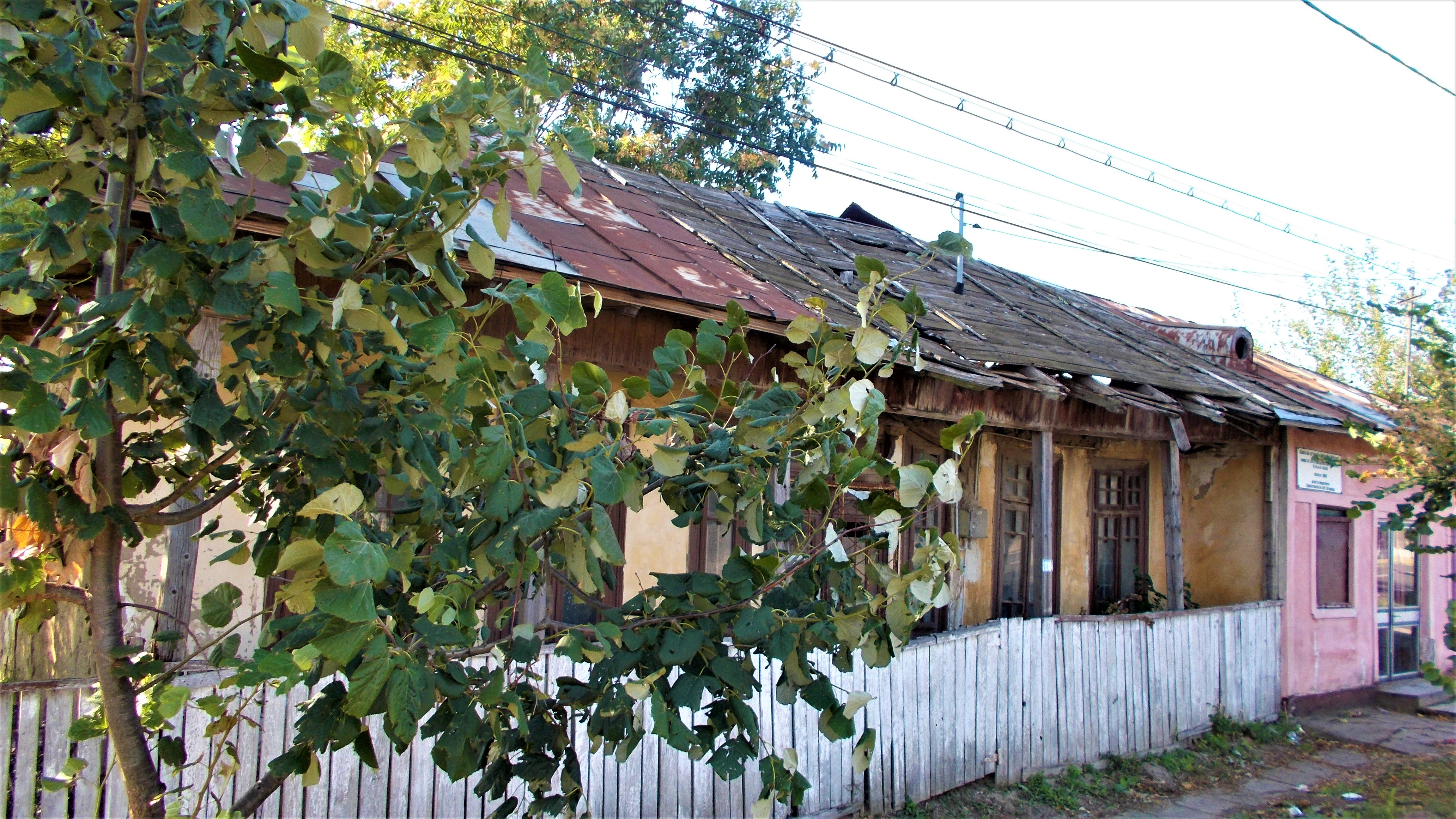 Casă cu prăvălie Zaharia Moraru, satul Ograda, județul Ialomița